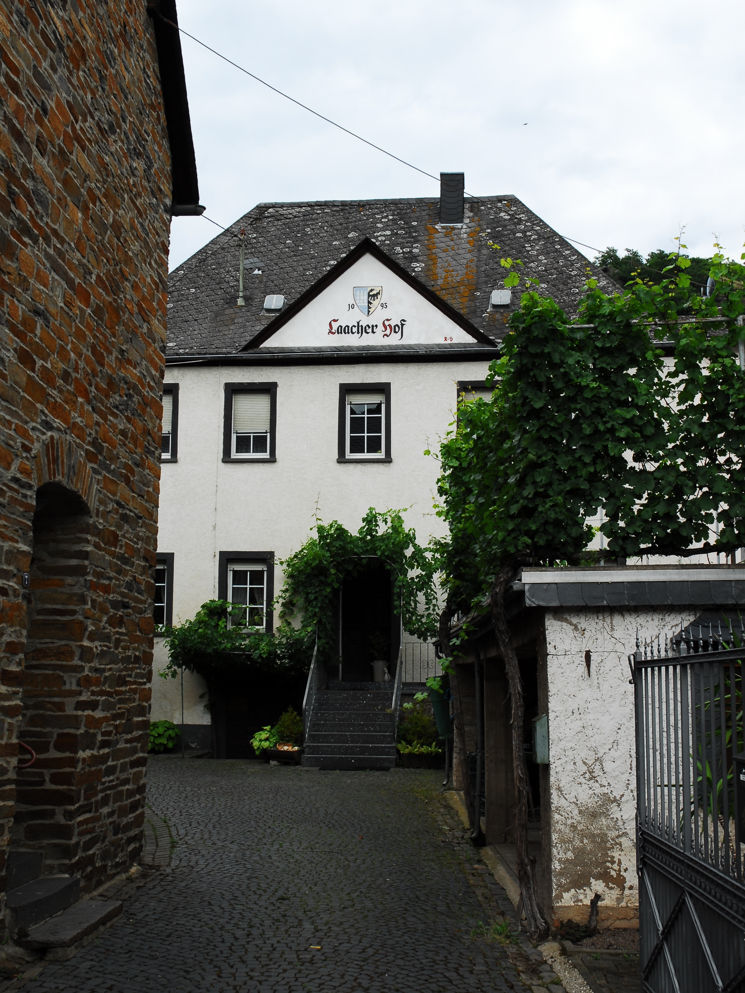 Laacher Hof in Alken (Untermosel), Moselstraße 8: Walmdachbau, 18. Jahrhundert.